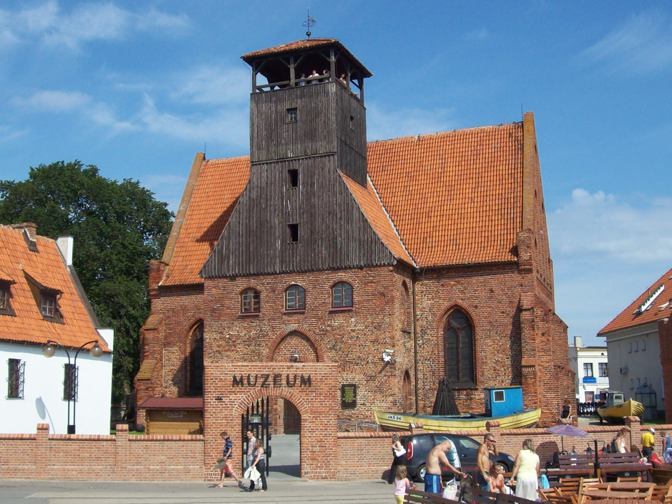 Hel (Polska) - Muzeum Rybołówstwa Morskiego